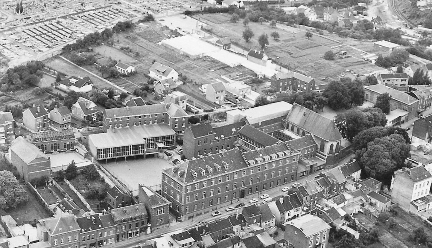 Vue aérienne du Collège Saint-Quirin (v.1980)